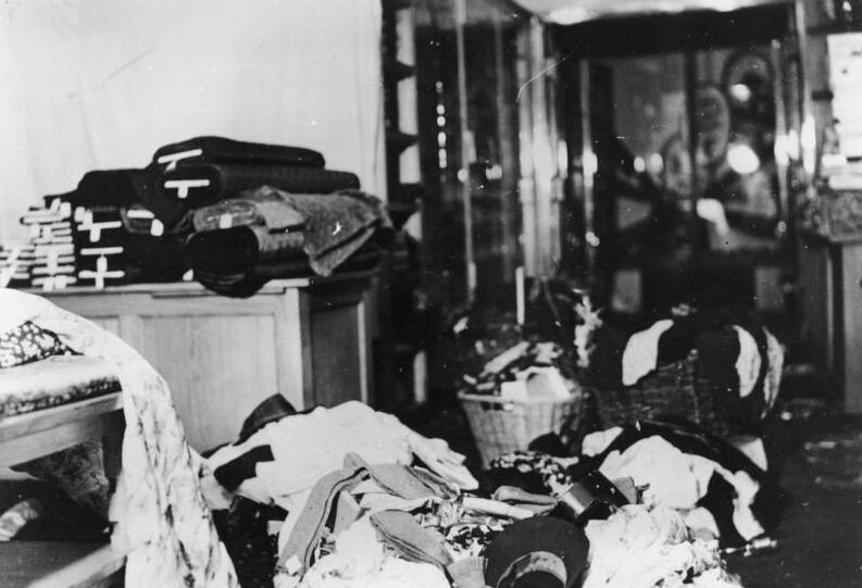 München, Kaufhaus Uhlfelder, Zerstörungen "Reichskristallnacht", Zerstörungen beim Kaufhaus Uhlfelder, 9.-10.11.1938 [München.- Reichspogromnacht / "Reichskristallnacht".- Zerstörungen im Kaufhaus Heinrich Uhlfehlder GmbH]